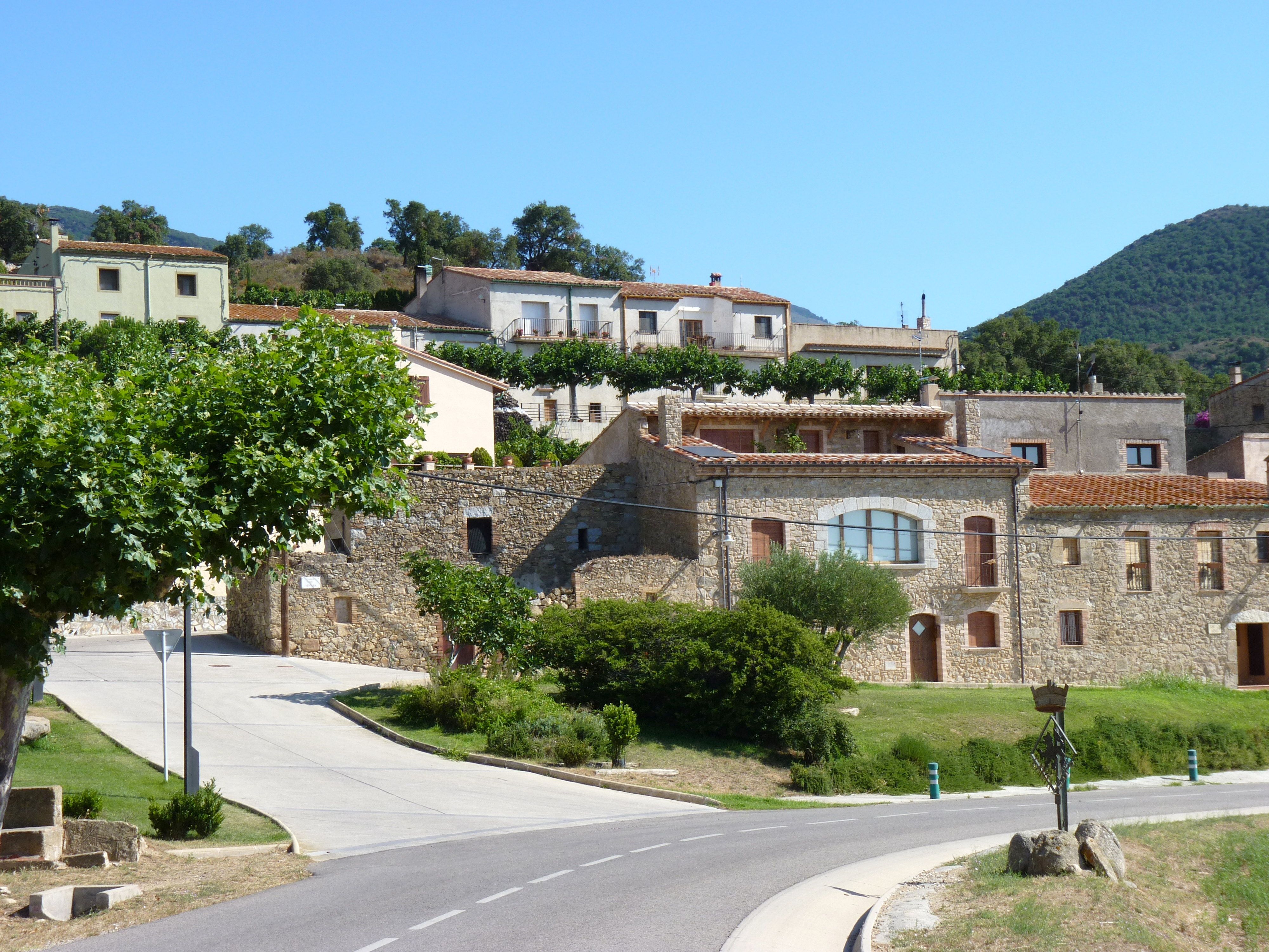 Vue de la rue Pep Ventura, Cantallops (Haut-Ampurdan, Gérone, Catalogne, Espagne)